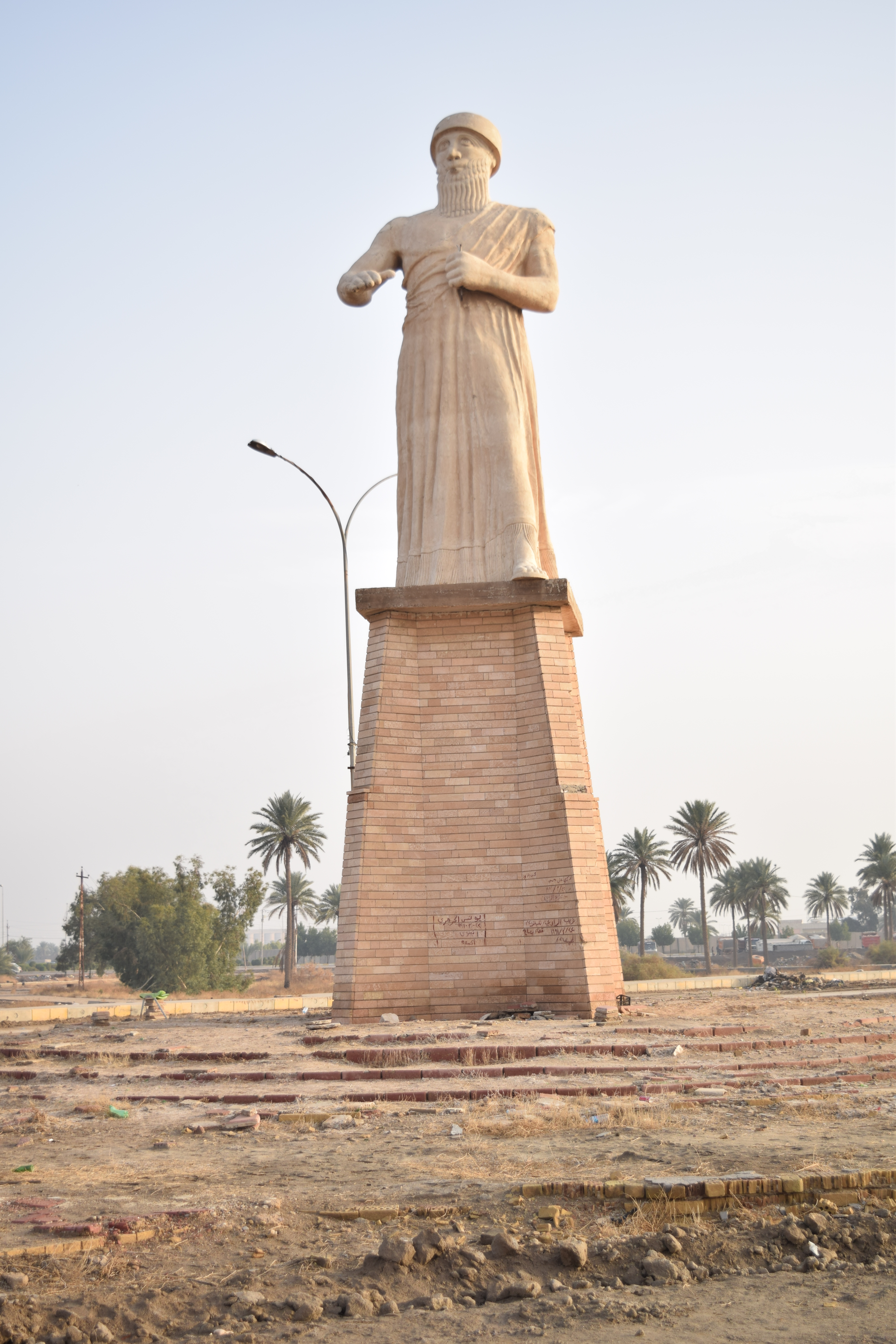 صورة لتمثال حمورابي في الحلة بالقرب من مدينة بابل الأثرية.